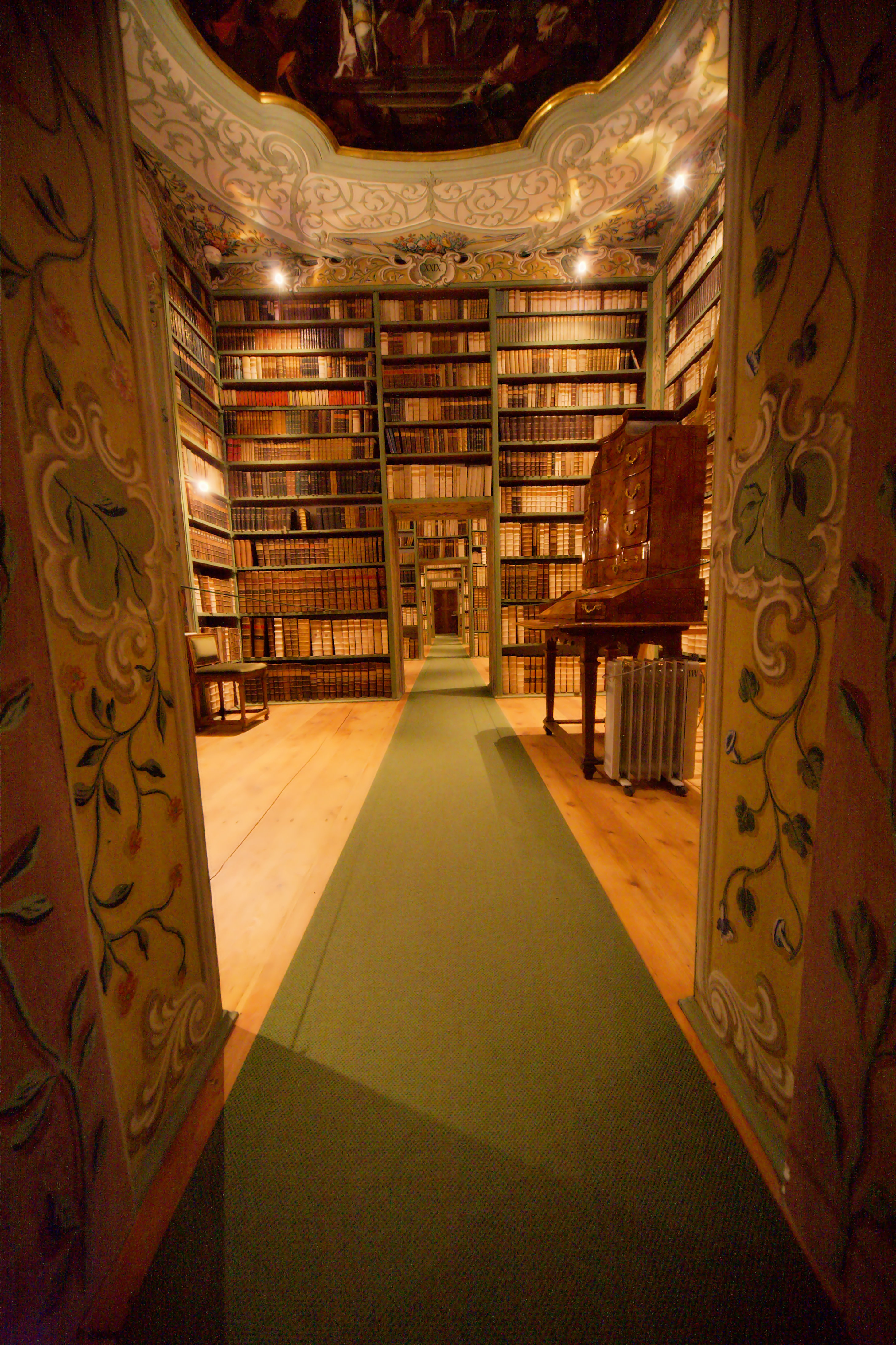 Stift St.Peter, Zellenbibliothek